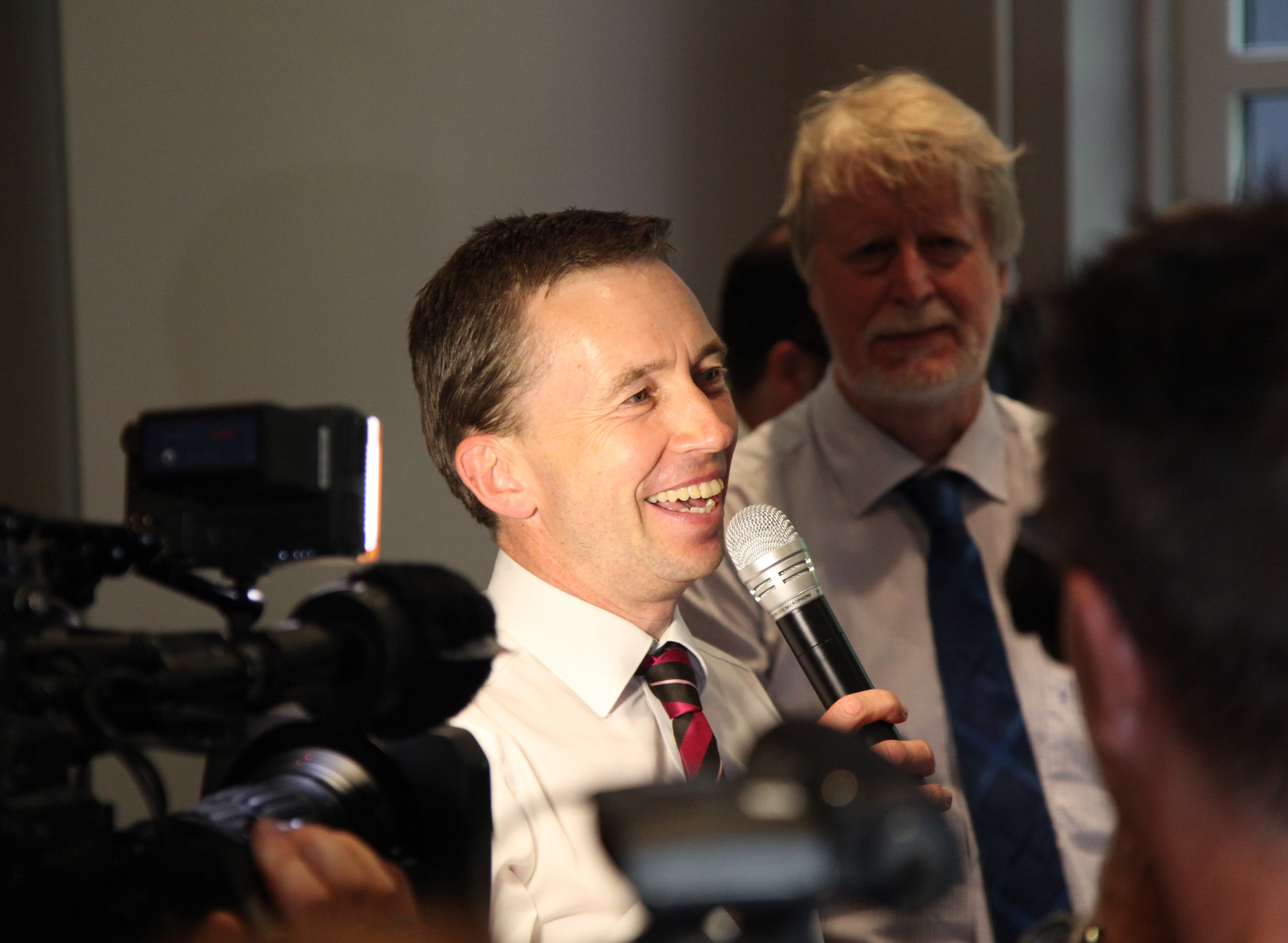 Bernd Lucke Interview auf der Gründungsversammlung der Partei ALFA, 19.7.2015